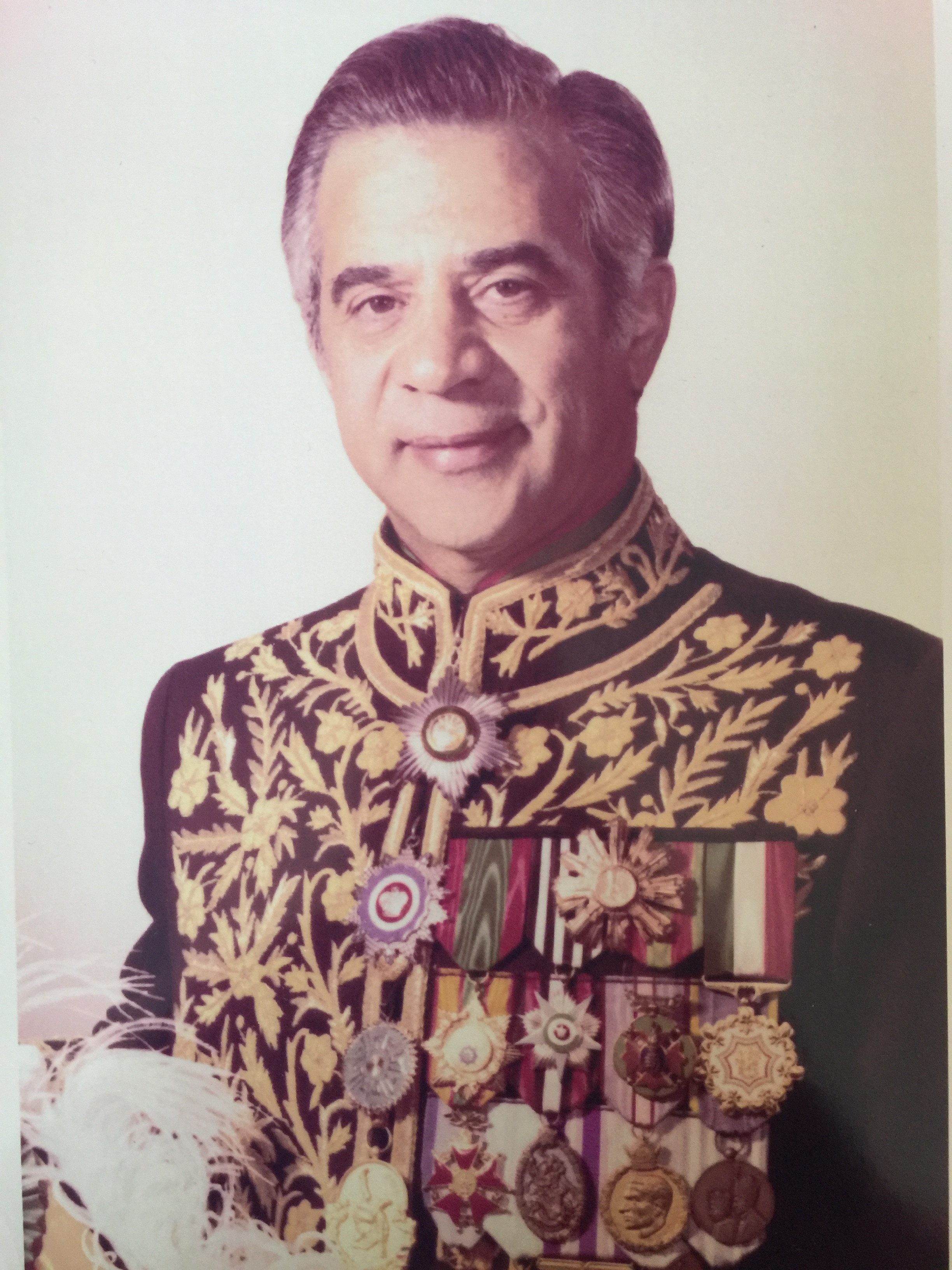 مهندس جواد شهرستانی